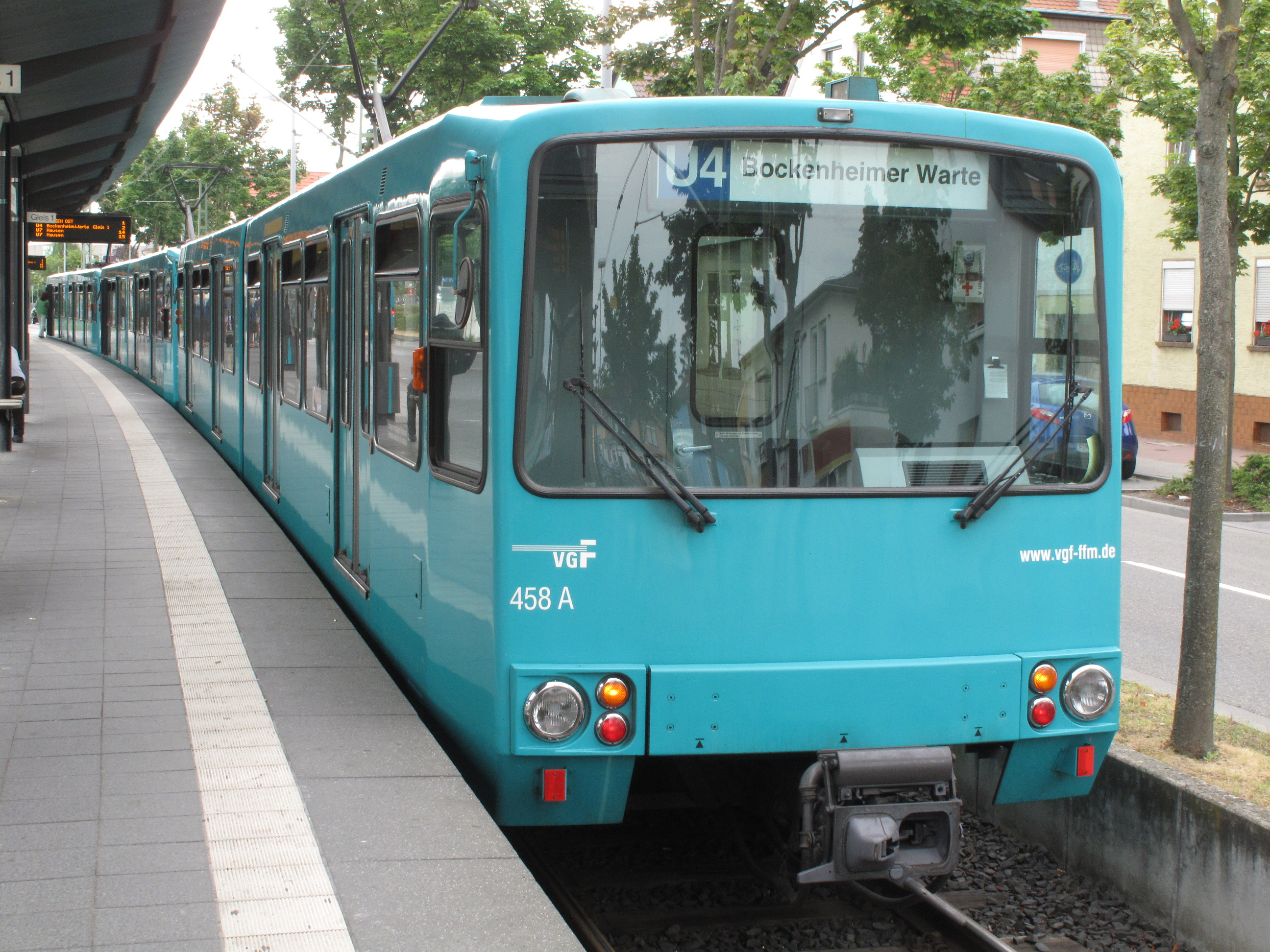 Frankfurt, U-Bahnhof Enkheim, Linie U4 Richtung Bockenheimer Warte